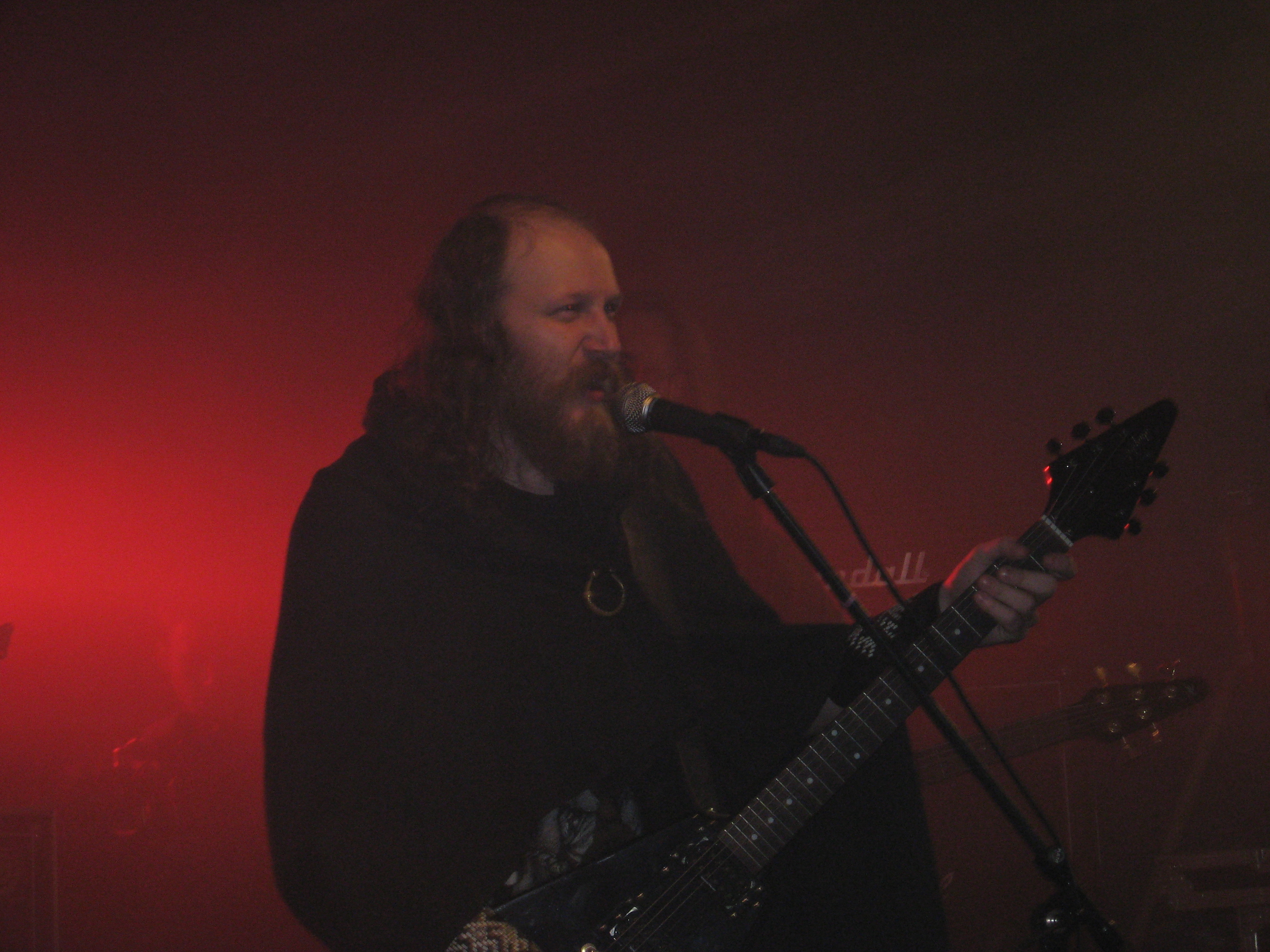 Playing at Zvērā Festival 2009 (Latvia).